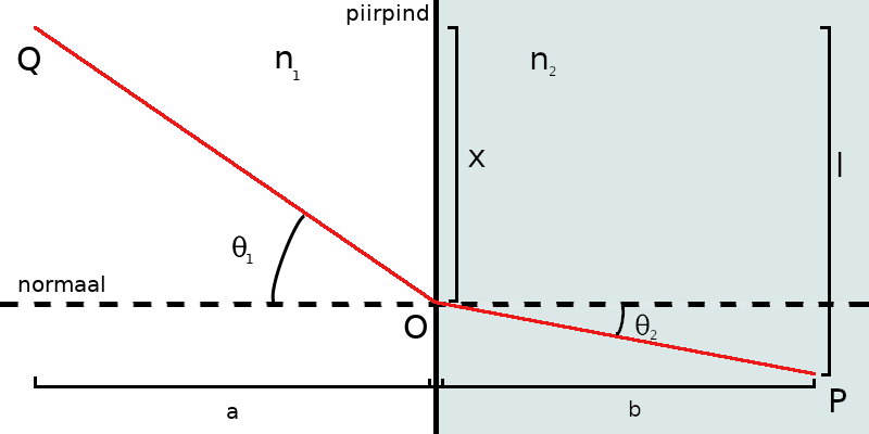 Snelli seaduse illustratsioon